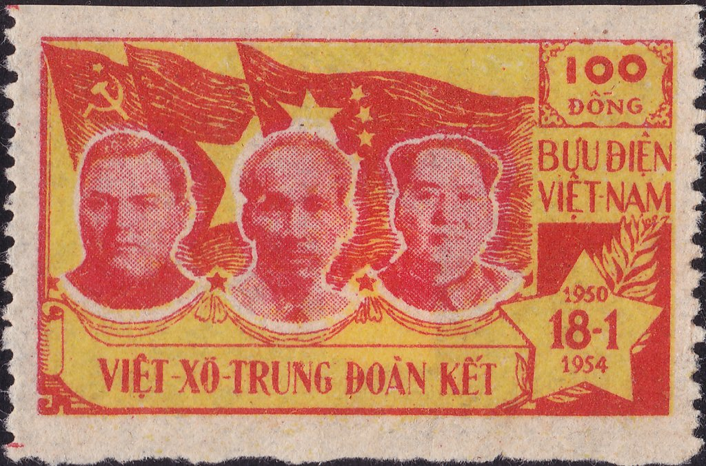 Вьетнамская марка 1954 года с Маленковым, Хо Ши Мином и Мао.